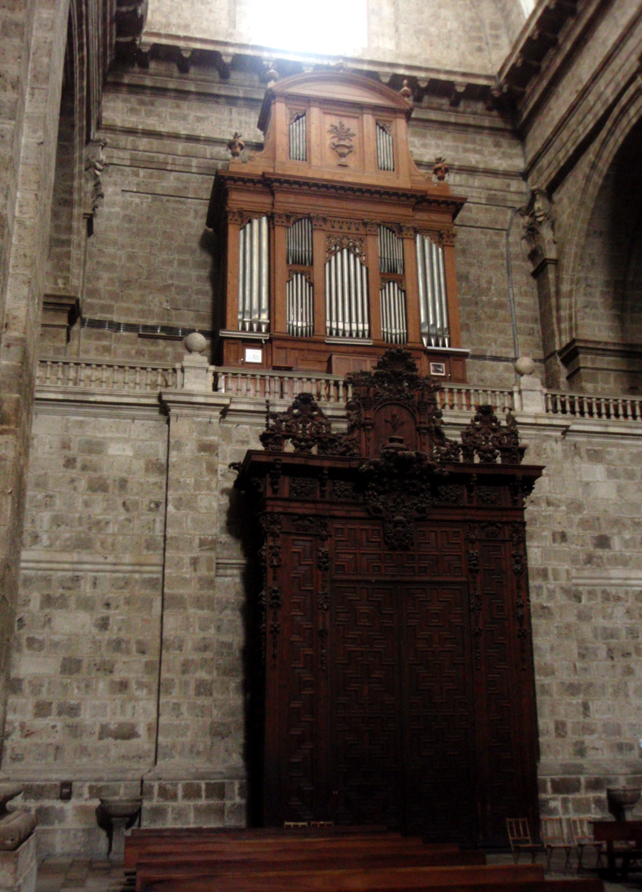 Catedral de Valladolid (España). Vista del interior hacia los pies, con el órgano Amezua, su tribuna construida en 1928 y el cancel churrigueresco del siglo XVIII